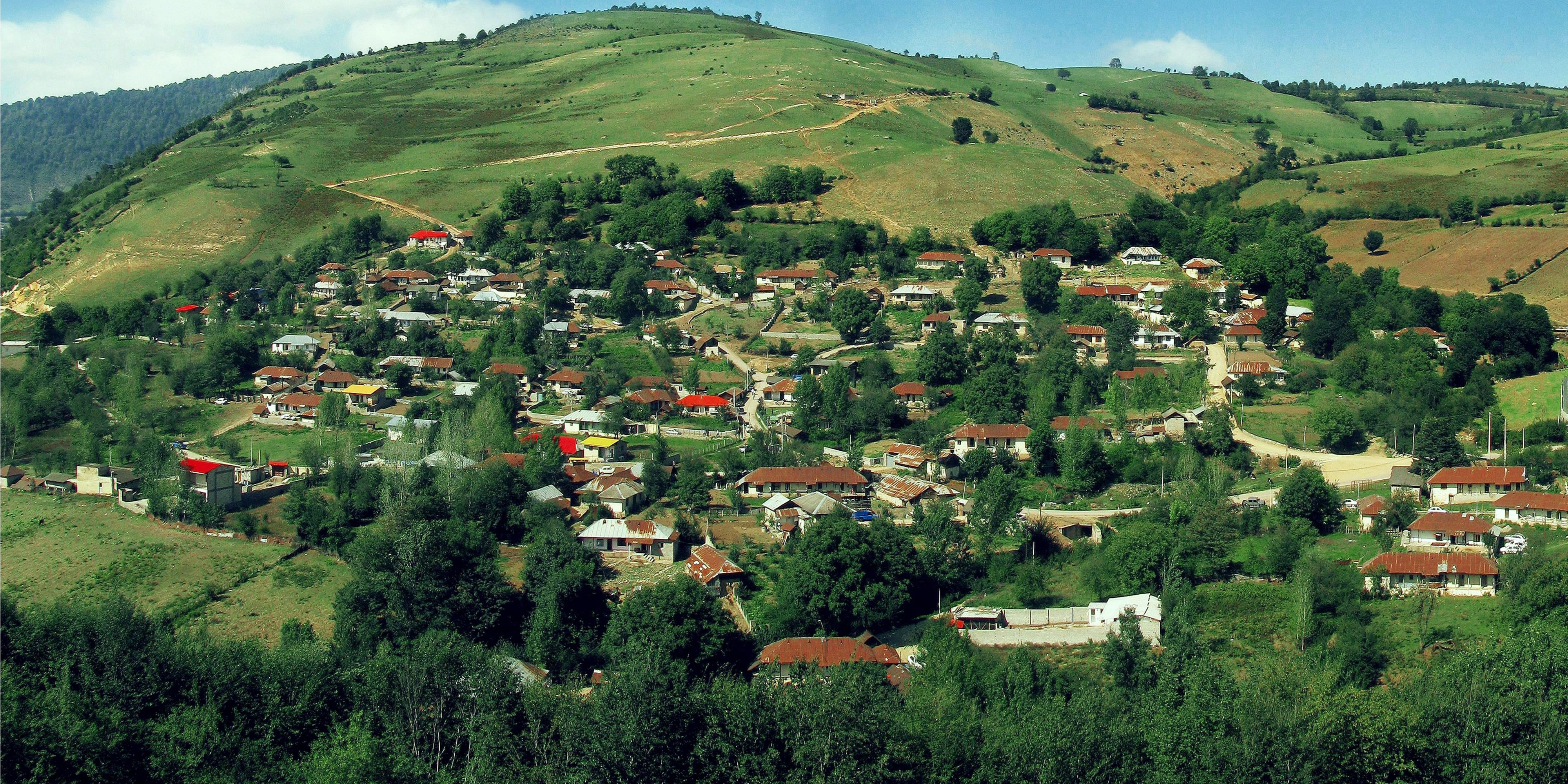 عکس توسط الف میم پاشا در تابستان 1388 گرفته شده است